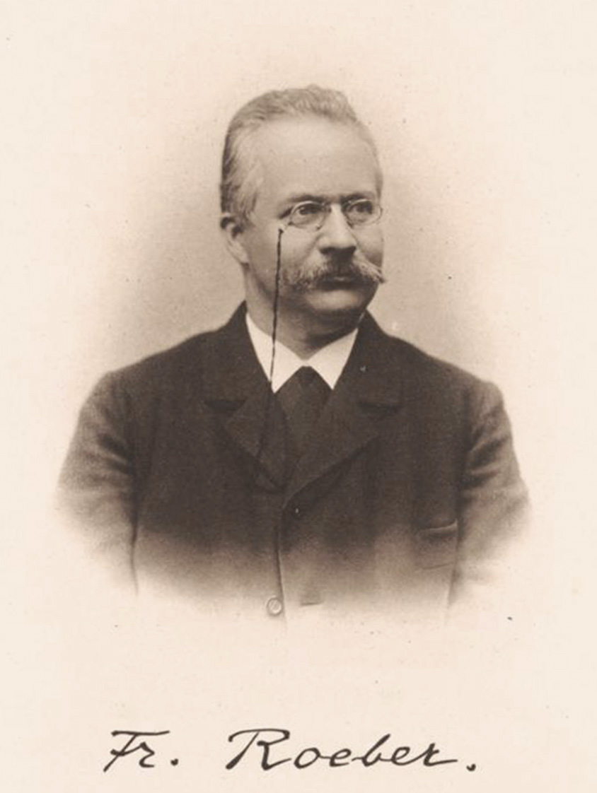 Fritz Roeber, Vorsitzender der Grossen Kunst und Gartenbau-Ausstellung, Düsseldorf, 1904